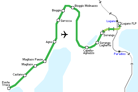 Streckenkarte der Ferrovia Lugano–Ponte Tresa Selbst gezeichnet von Voyager